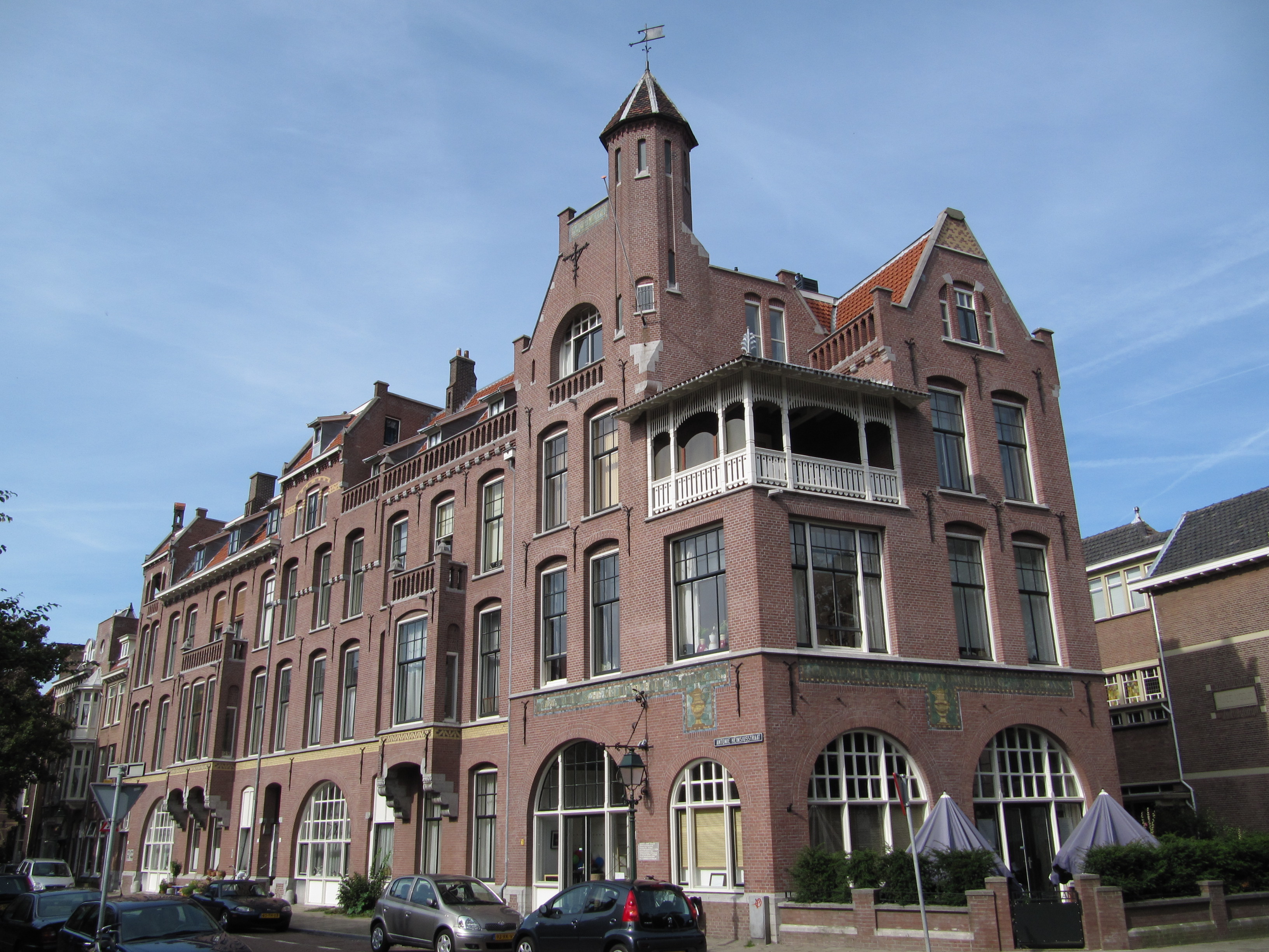 RM461426 Den Haag - Antonie Heinsiusstraat 3A.jpg